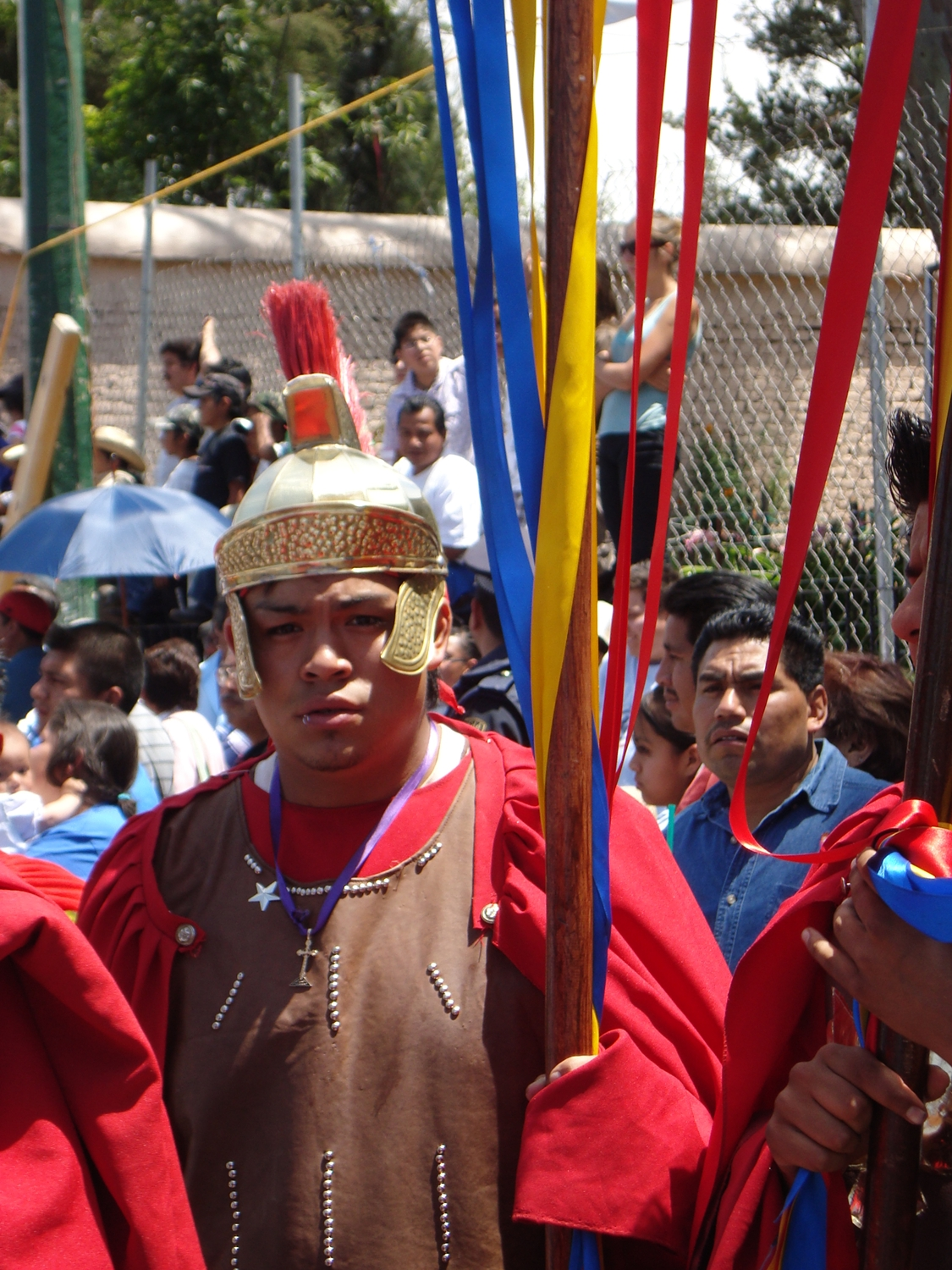 Un romano en la representación de la Pasión de Cristo en Iztapalapa (México).